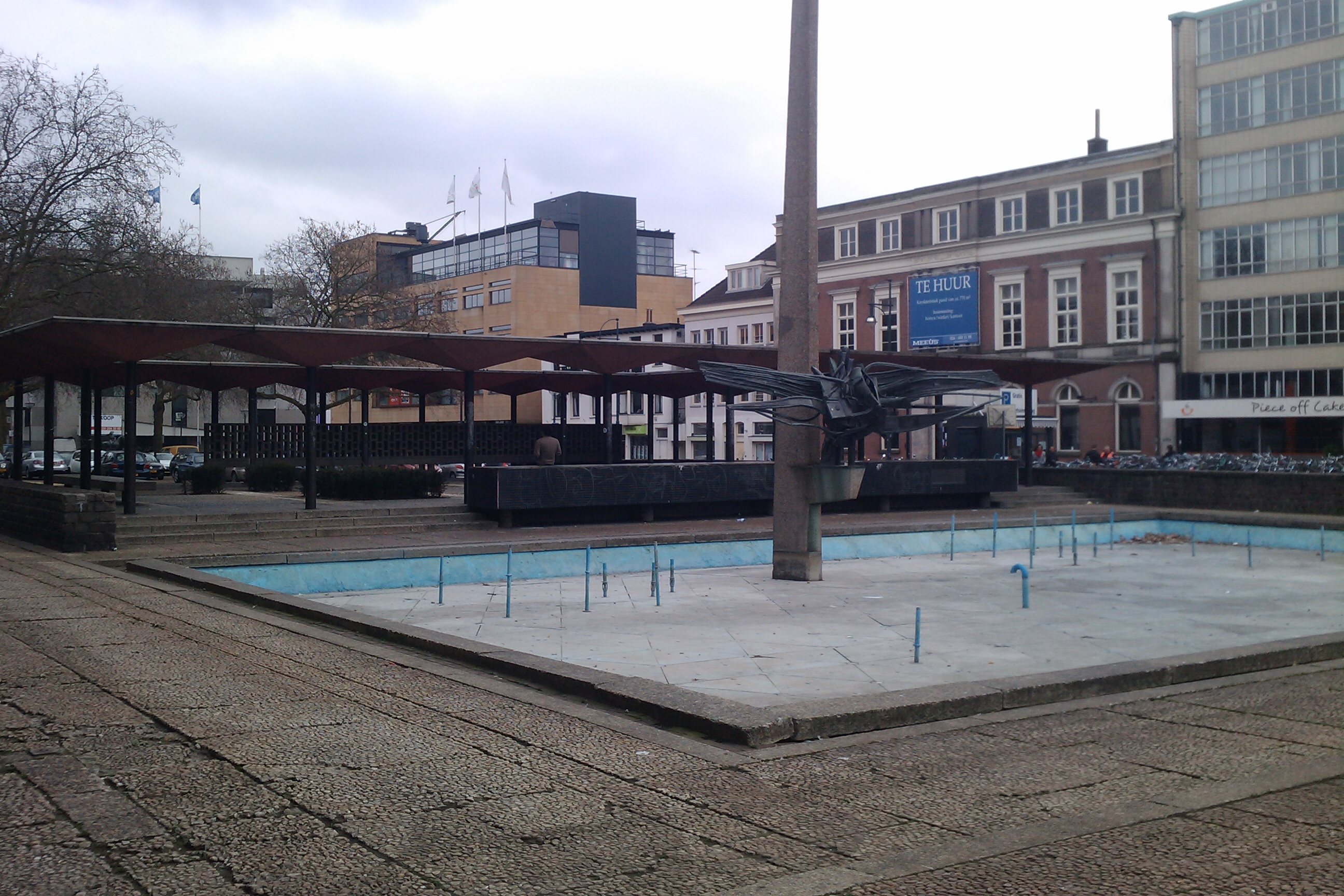 AKU Fontein op het Gele Rijders Plein in Arnhem Its number in the list of 89 proposed monuments is: k2013-018 For more information see Dutch Wikipedia: Beschermingsprogramma Wederopbouw 1959-1965